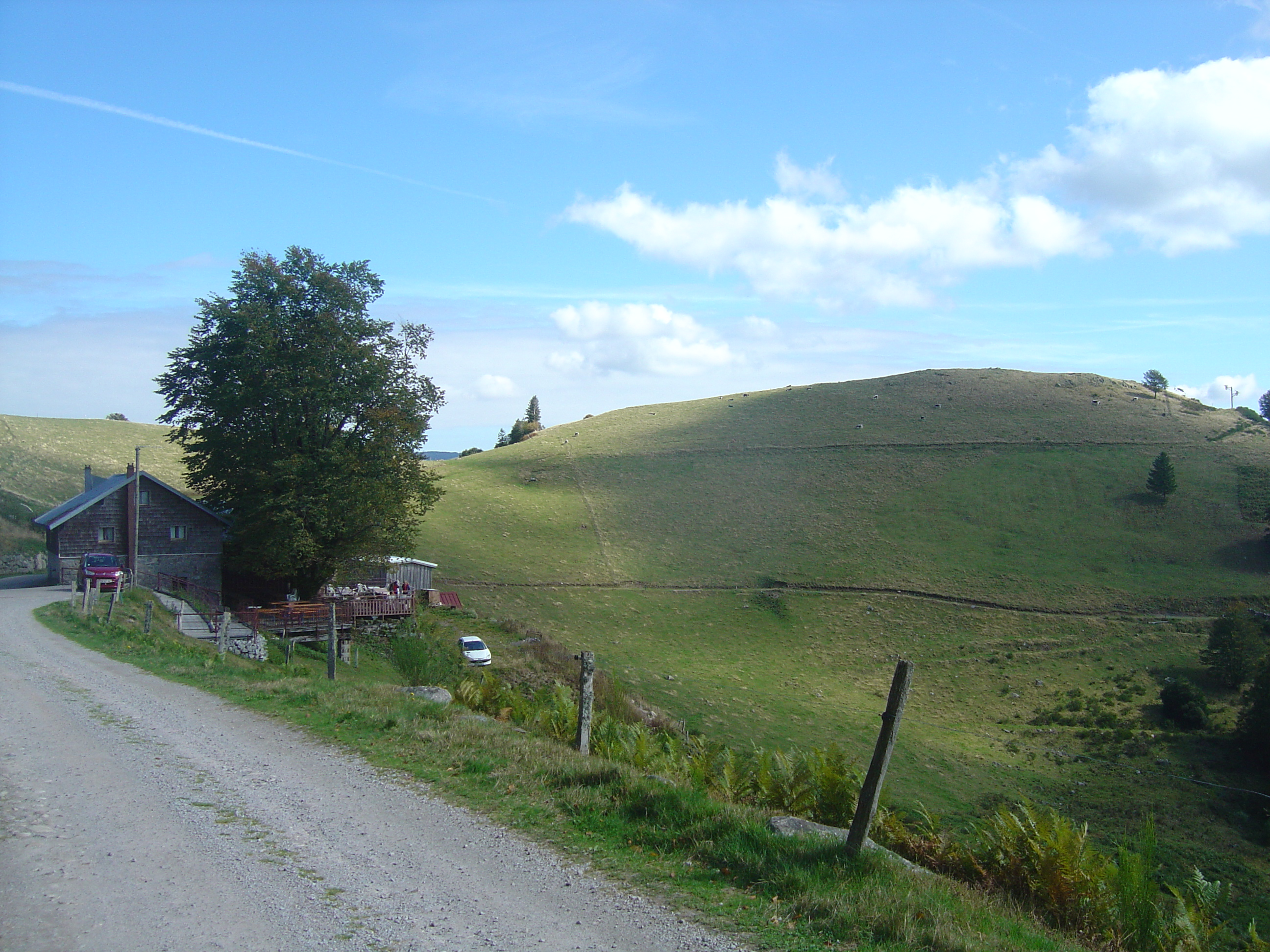 Ferme du Felsach dans la réserve naturelle du massif du Ventron.